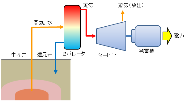 背圧式地熱発電設備の概略図（参考：地熱学会、地熱エネルギー入門（翻訳）地熱資源の利用）